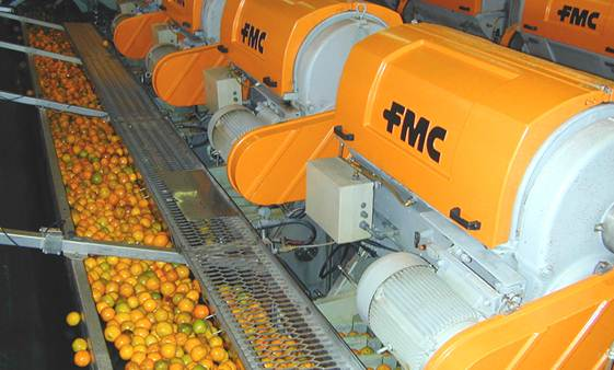 Förderband Orangen mit Zitruspressen